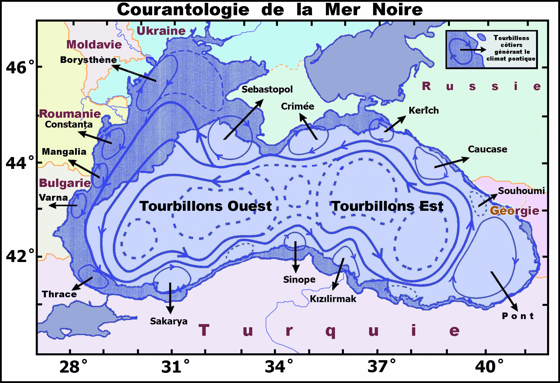 Courantologie de la Mer Noire d'après les articles océanographiques disponibles